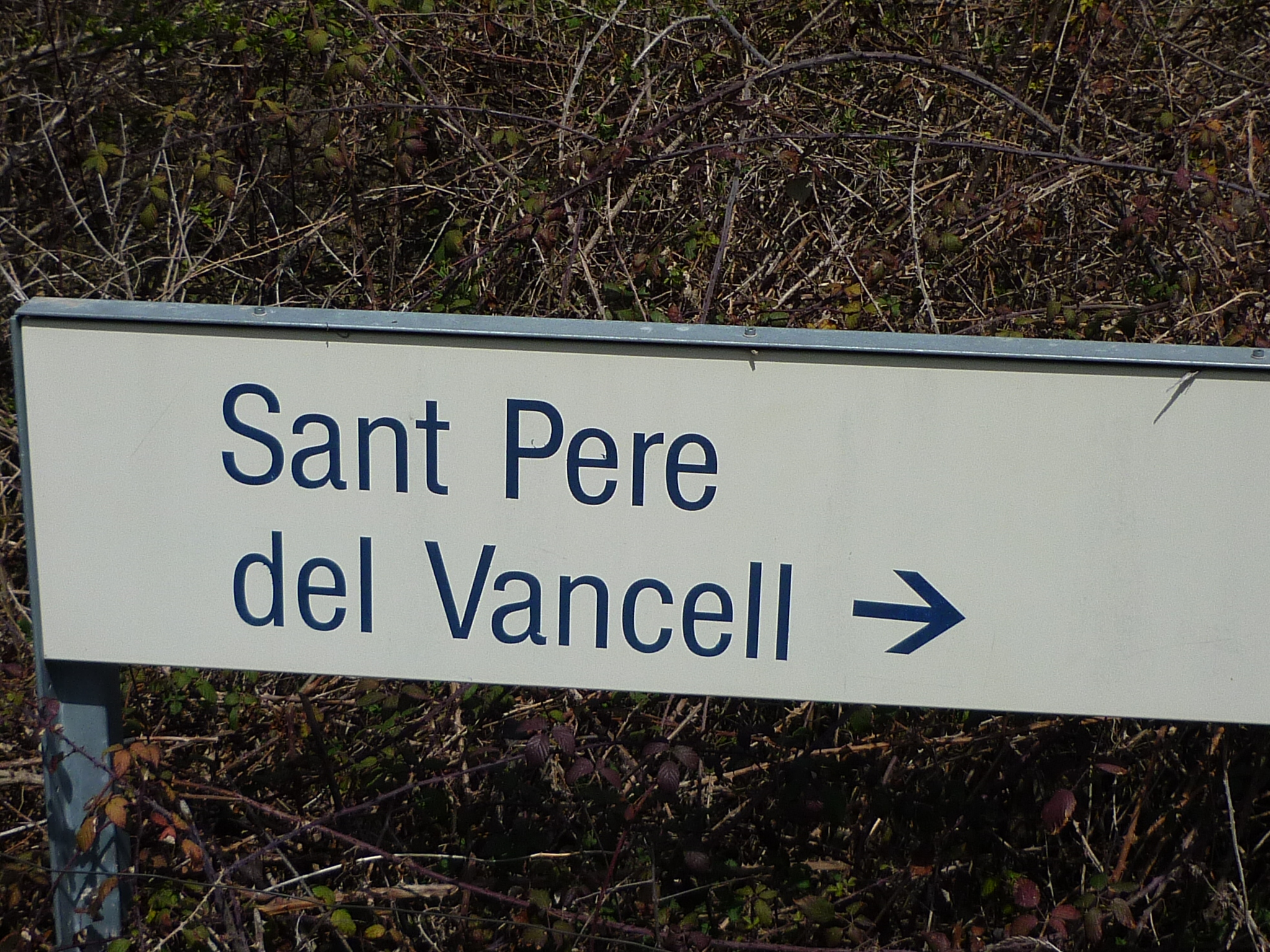 Capella de Sant Pere, o Sant Josep o Sant Urbà (Guixers): Indicador